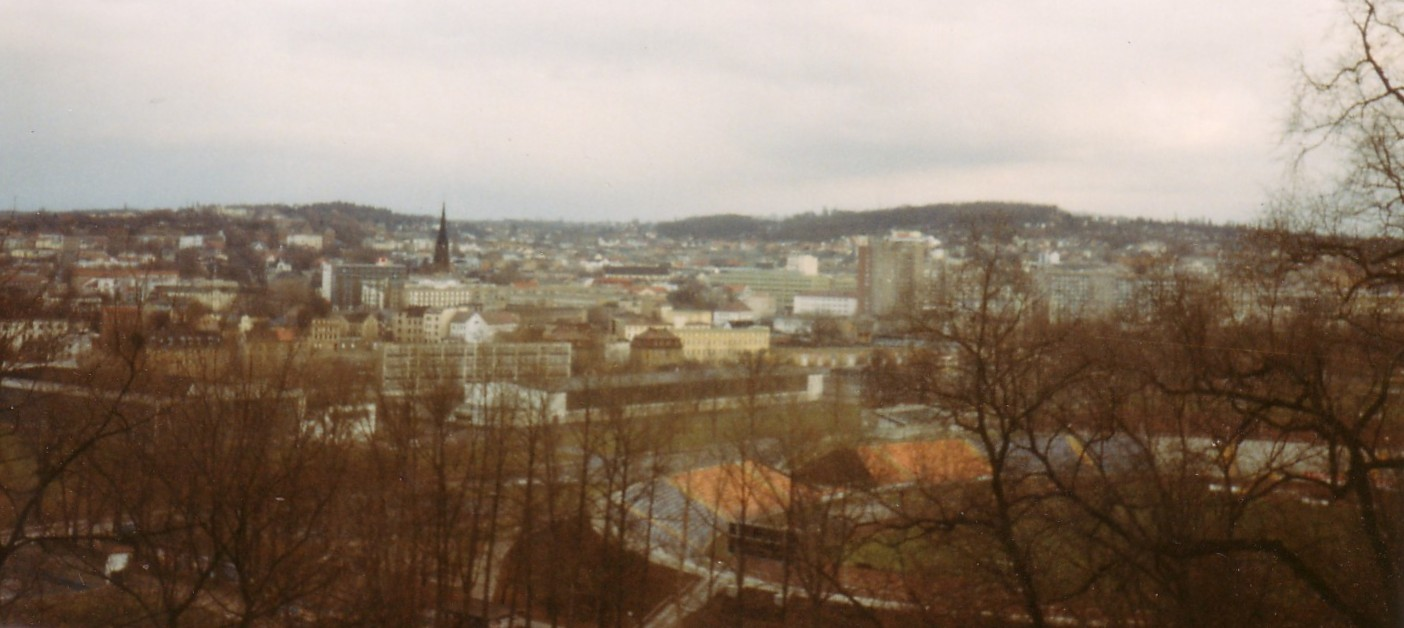 later Hofwiesenpark (Gera, Germany)/späterer Hofwiesenpark (Gera, Deutschland)